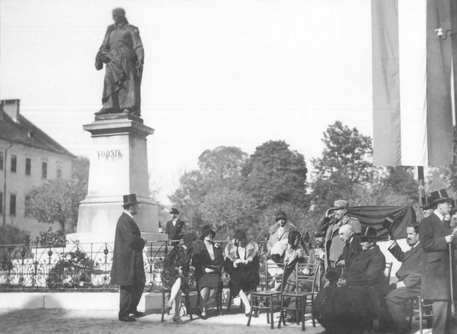 Proslava ob 120-letnici Napoleonove lIirije 1929